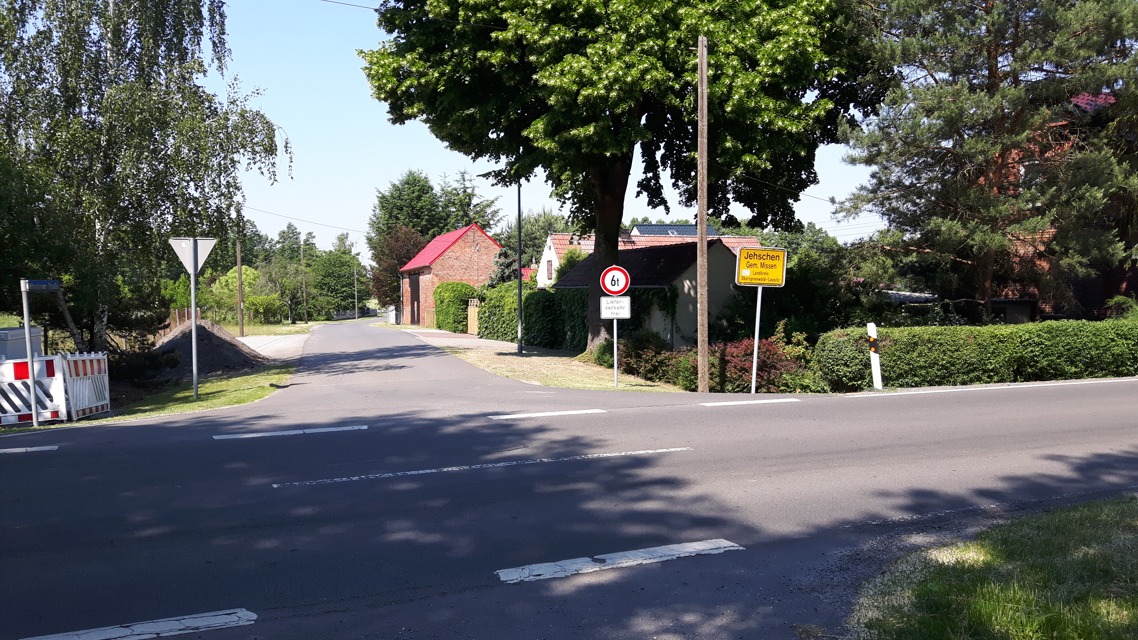 Der Wohnplatz Jehschen in der Stadt Vetschau